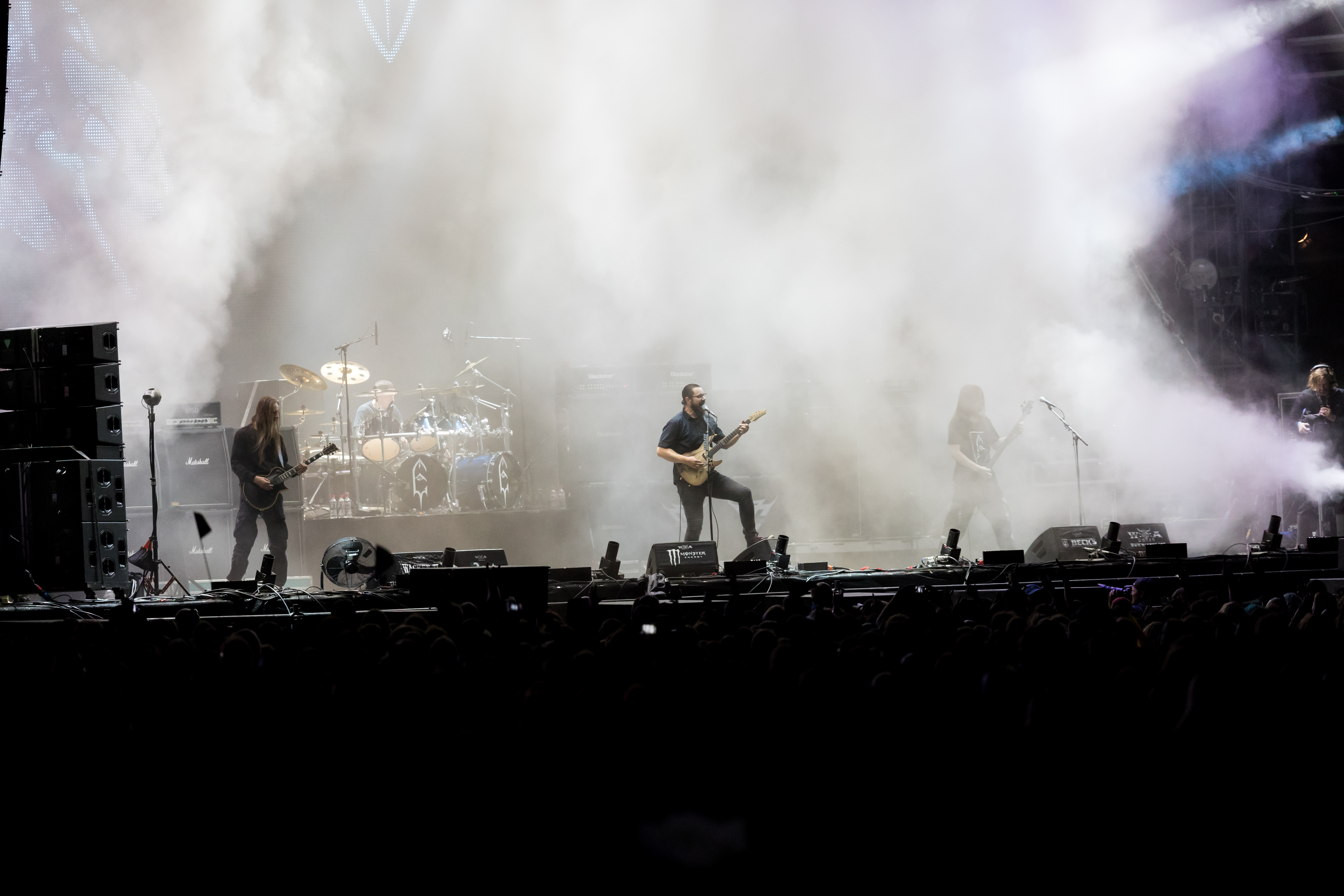 Emperor during Wacken Open Air at Schleswig-Holstein, Wacken, , Germany on 2017-08-04, Photo: Sven Mandel